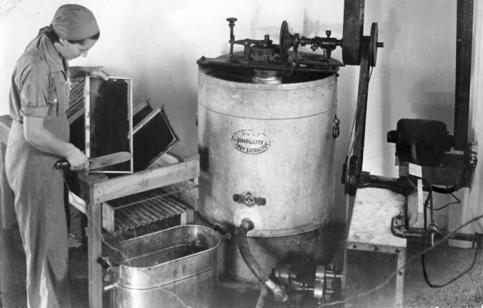 בתיה גולן פותחת את החלות והכנסתן לצנטרפוגה להפקת הדבש במכוורת גן-שמואל 1938